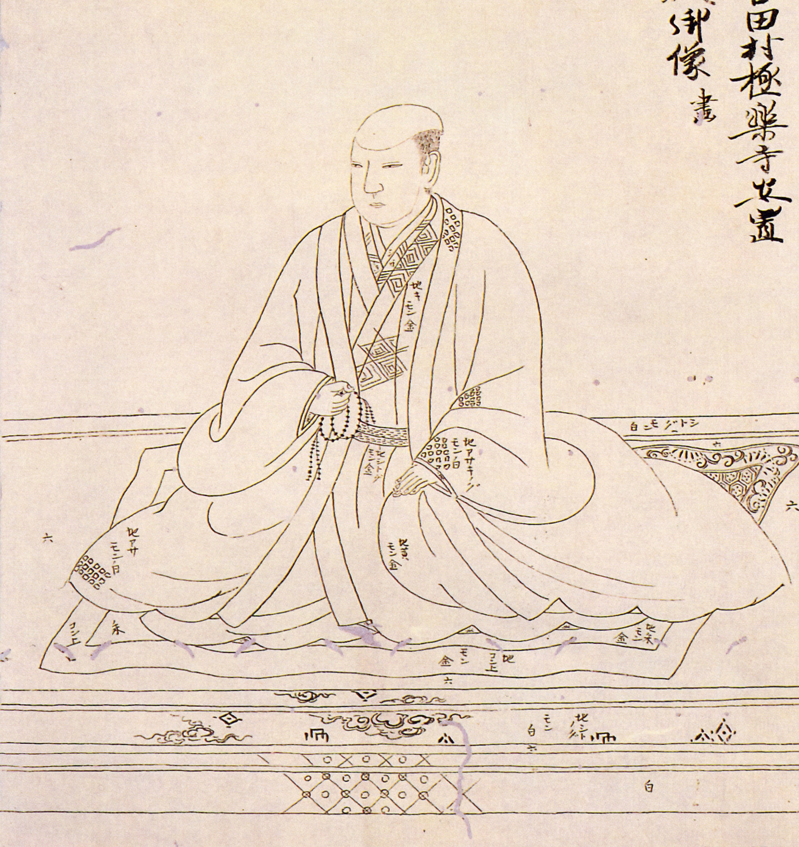 大凉院(栄姫、黒田長政継室)の肖像。